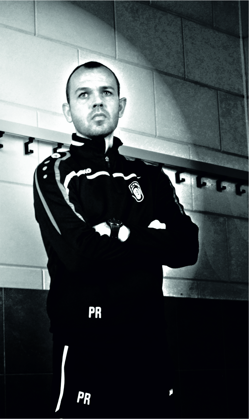 Trainer Peter Reekers